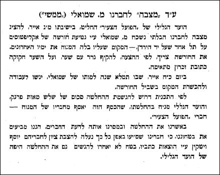 מכתב של הועד הגלילי של "הפועל הצעיר" לגבי נטיעת חורשת אקליפטוס בכינרת כמצבה לזכר מנחם שמואלי (ממש"י) ביום השנה למותו (1912)